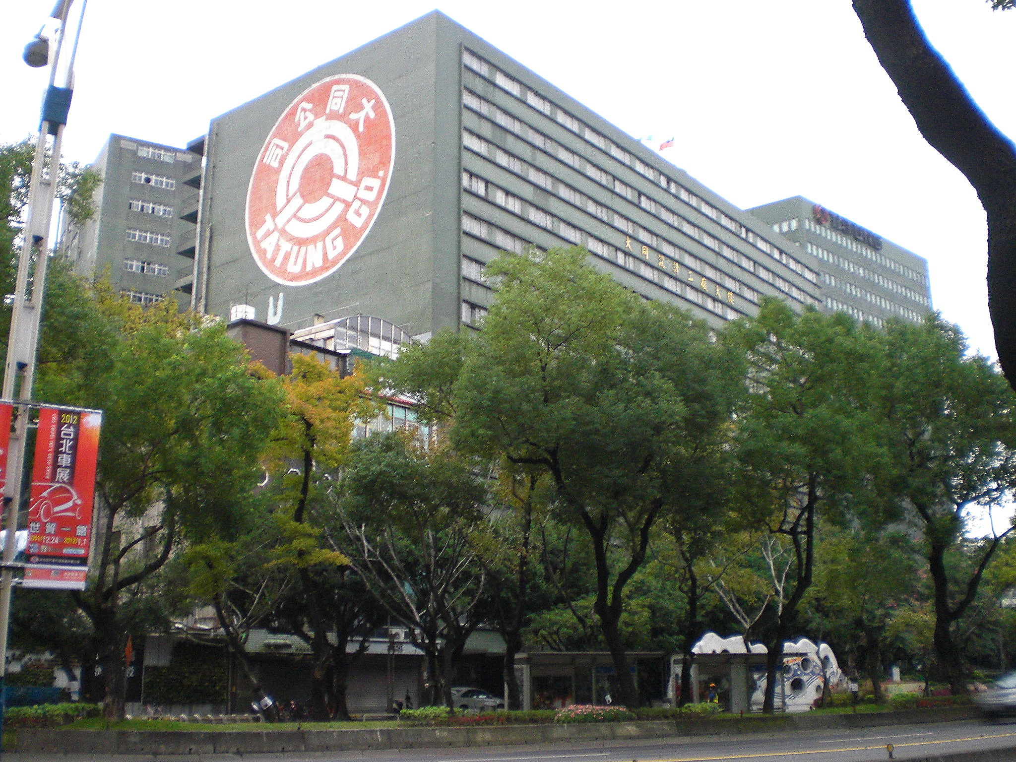 中文（台灣）: 大同設計工廠大樓，外牆漆大同公司商標，前方公園為撫順公園。